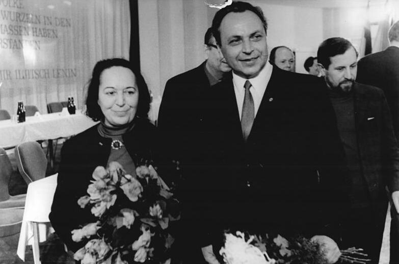 Zentralbild Franke 30.4.70 Berlin: VI. Kongreß des Vorstandes Bildender Künstler der DDR wählten neuen Zentralvorstand Die Delegierten des Kongresses wählten am 30.4.70 zum Abschluß der dreitägigen Beratung den neuen Zentralvorstand und das Präsidium des Verbandes. Als neuer Präsident wurde der Dresdner Maler Prof. Gerhard Bondzin (r.) gewählt. Prof. Lea Grundig wurde nach langjährigem erfolgreichem Wirken aus diesem Amt verabschiedet und zur Ehrenpräsidentin gewählt (l.).